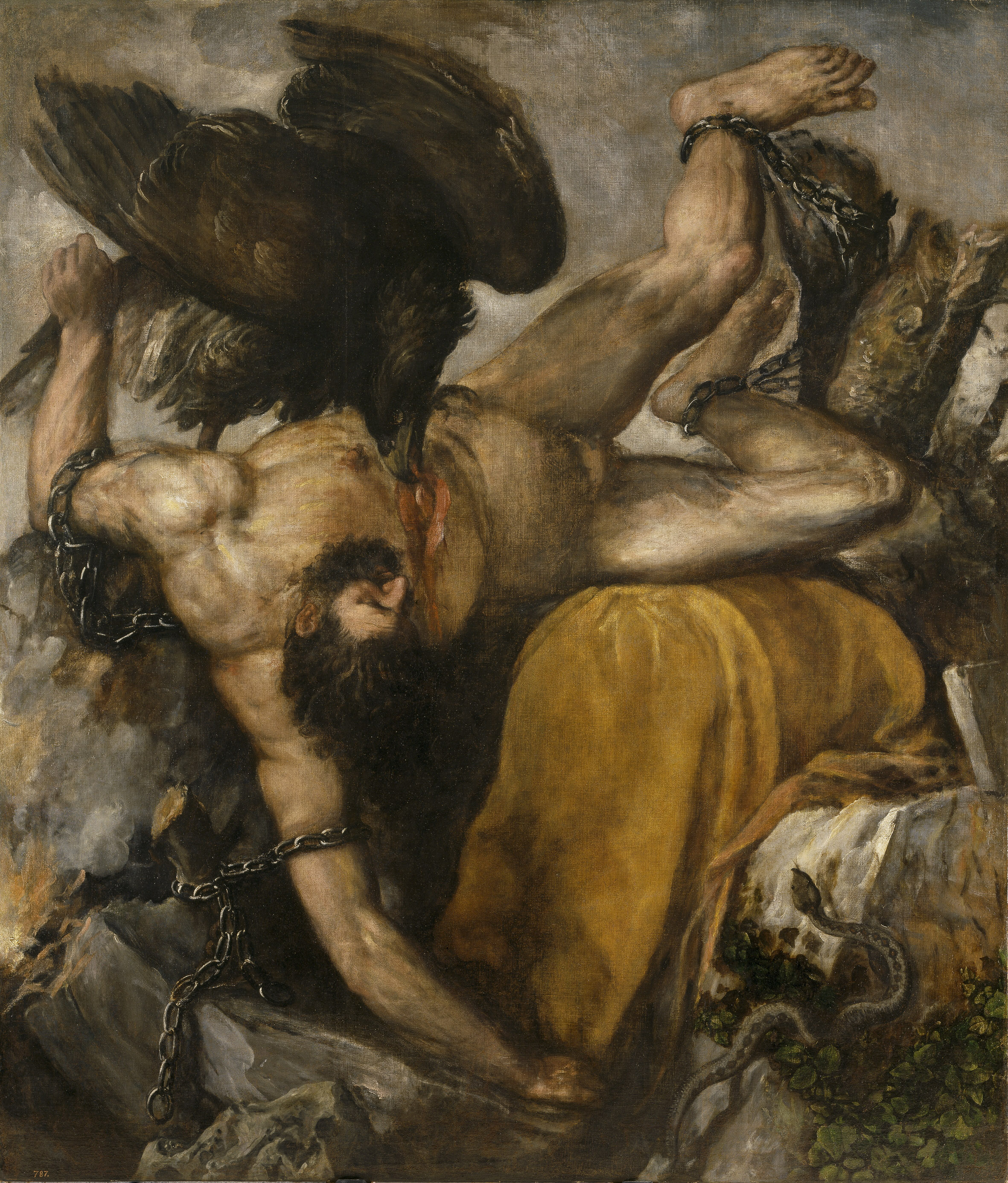 La obra representa a Ticio, a quien su padre, Zeus, condenó a sufrir el eterno castigo de que un buitre le devorara el hígado y de que este se regenerase continuamente, convirtiendo su suplicio en interminable.